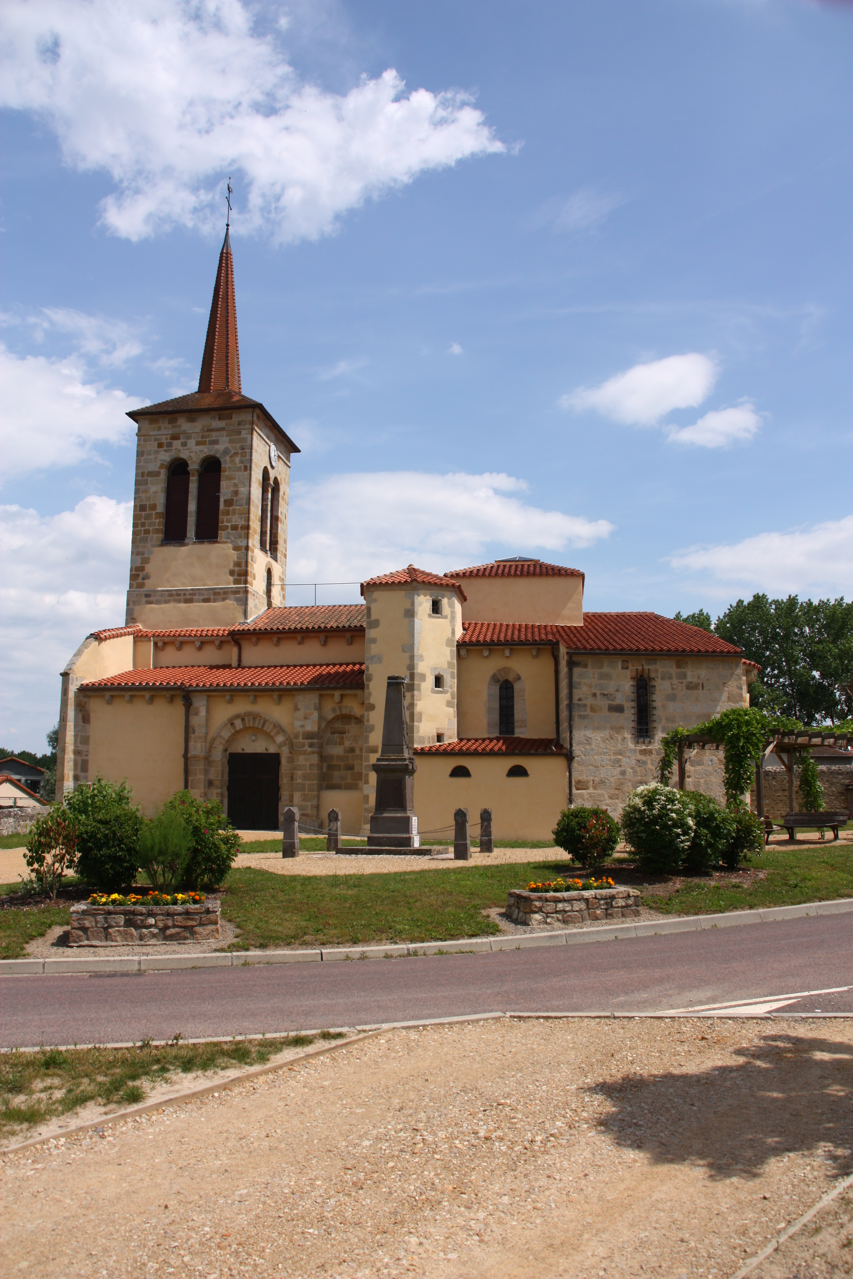 Edifice roman dont la construction remonte au XIIe siècle, à l'exception des bas côtés, de la tourelle octogonale (XVIe siècle) et de la grosse tour carrée du clocher avec flèche d'adjonction récente. Modeste, le sanctuaire conserve toutefois des chapiteaux, à l'intérieur et un portail surmonté d'un gros cordon à billettes.